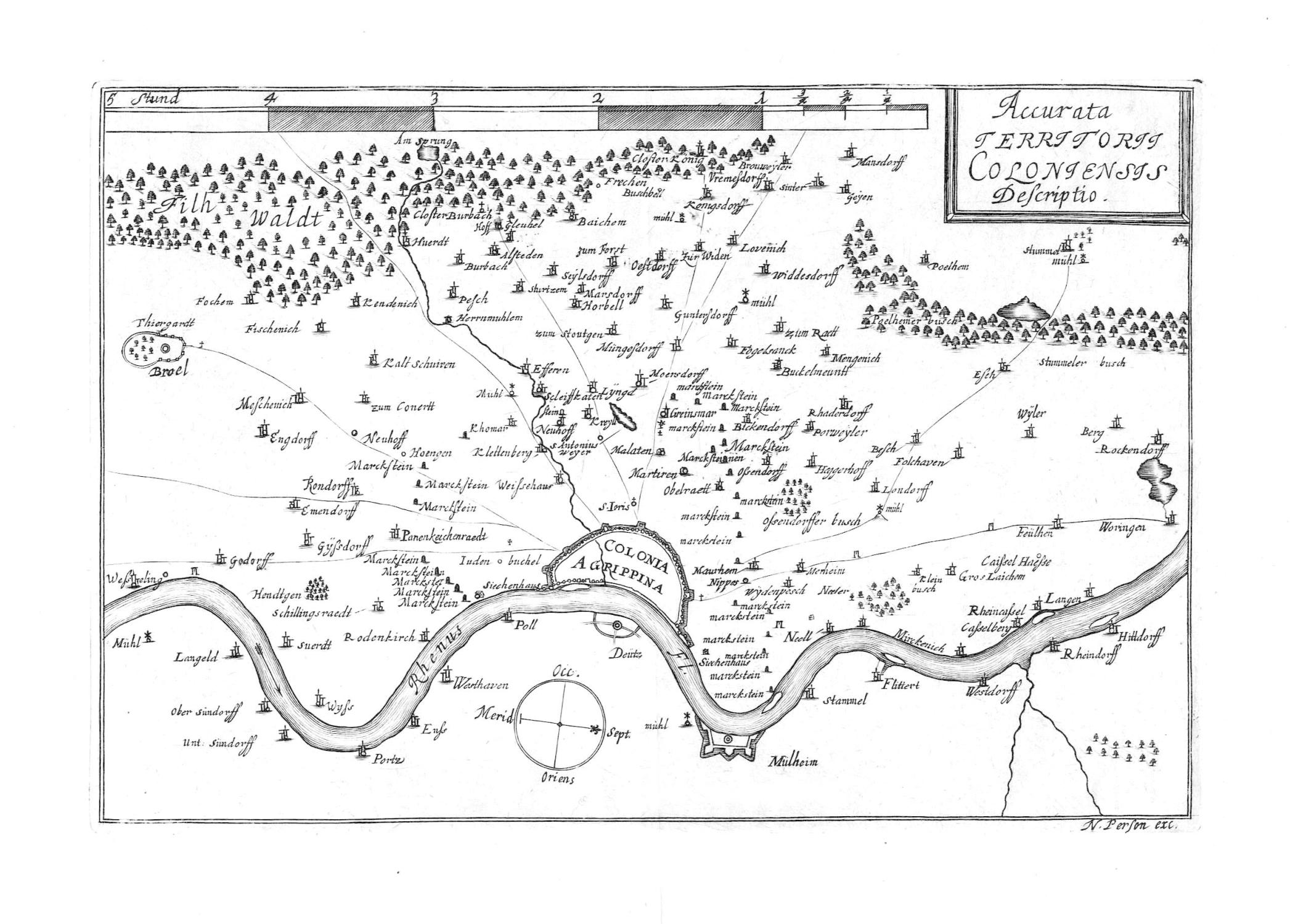 Accurata Territorii Coloniensis Descriptio: Eine Karte (Kupferstich) aus dem Festungsbuch Quotidiani Martis Labores cum specialibus Tabellis von Nikolaus Person aus dem Jahre 1692. Das Blatt ist annähernd nach Westen ausgerichtet und zeigt Köln (COLONIA AGRIPPINA) mit den umliegenden Gebieten.